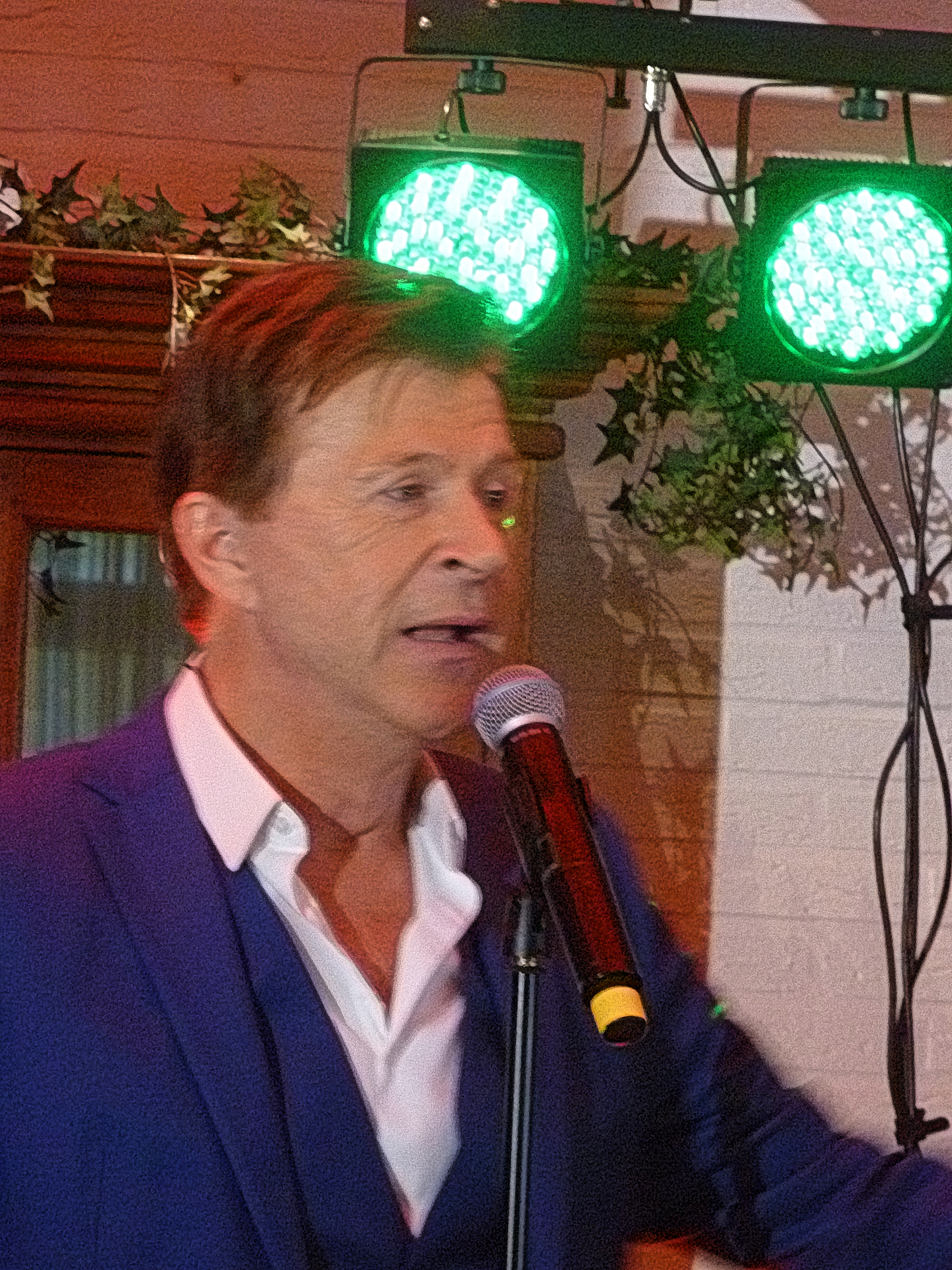 Jo Vally tijdens een concert in 2017